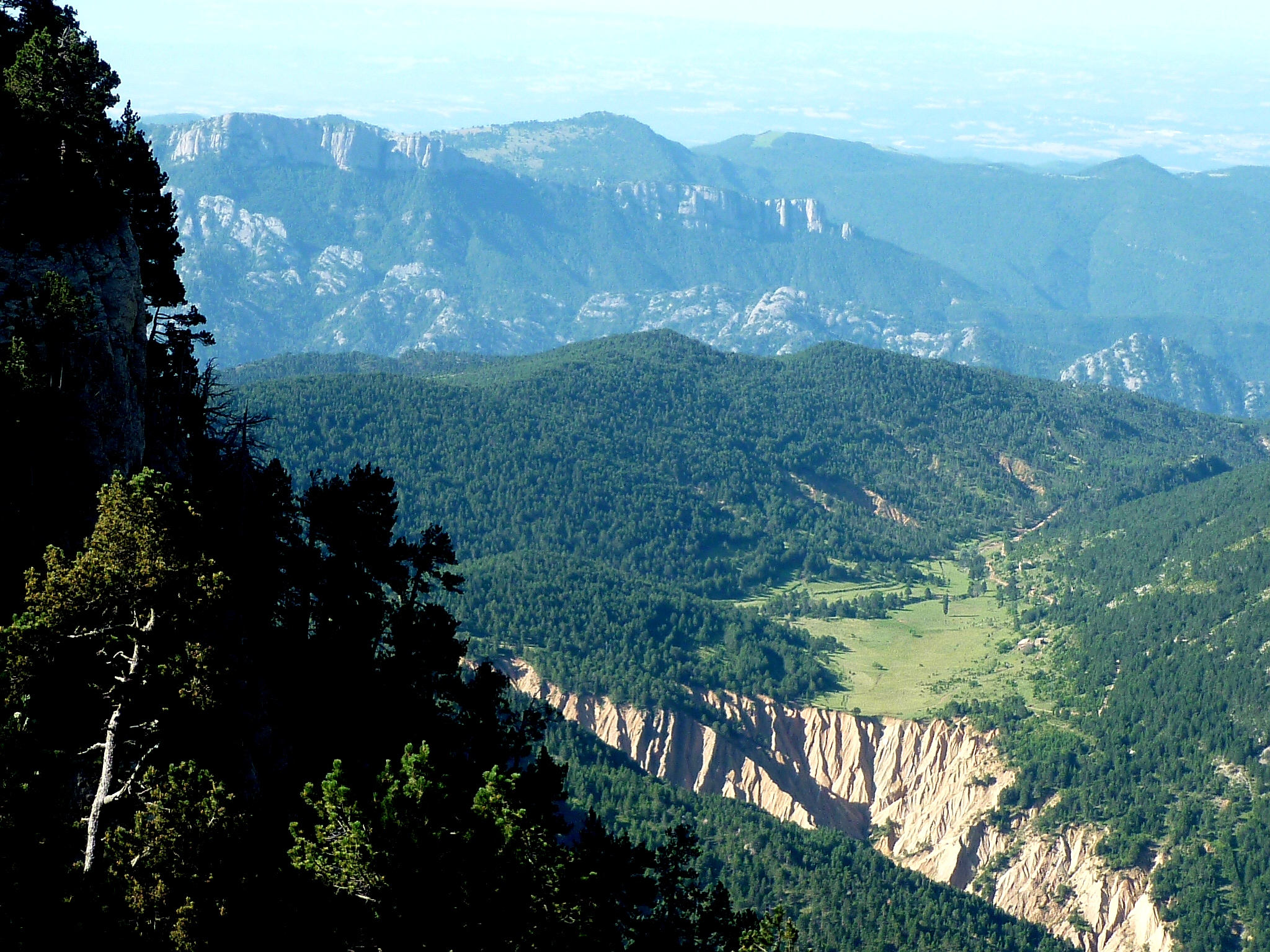 Des del Coll de Pradell: Altiplà de Pratformiu a la Coma i la Pedra (Solsonès - Catalunya)